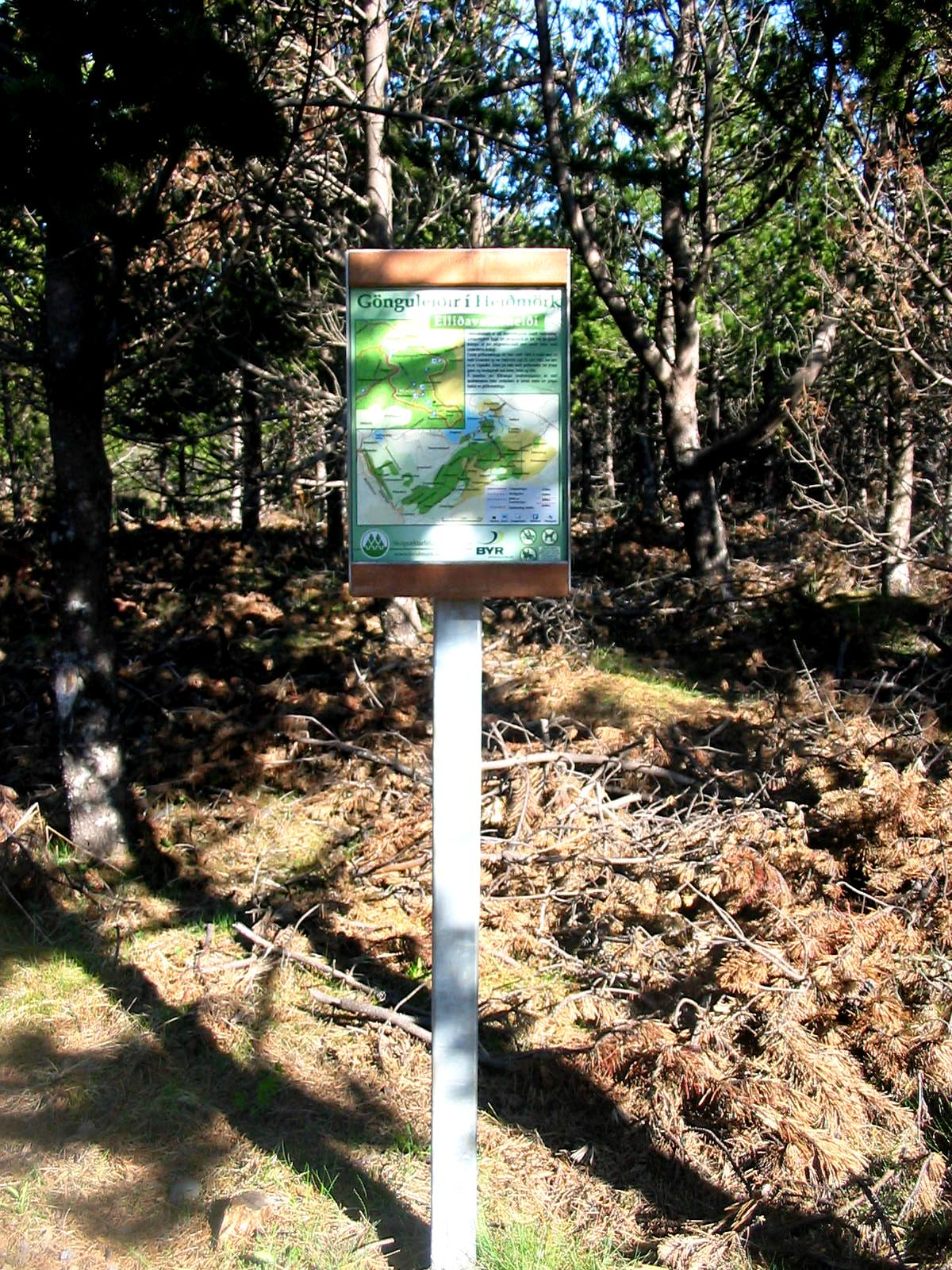 Heiðmörk natural reserve, Reykjavik, Iceland